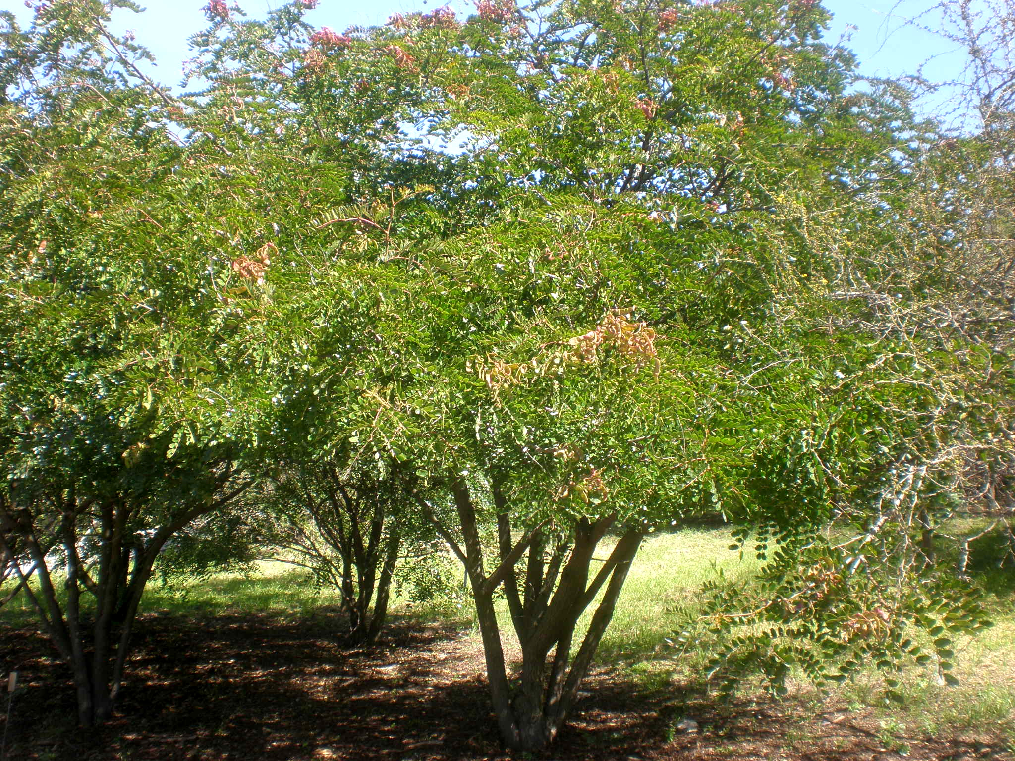 Jardín Botánico de Barcelona.